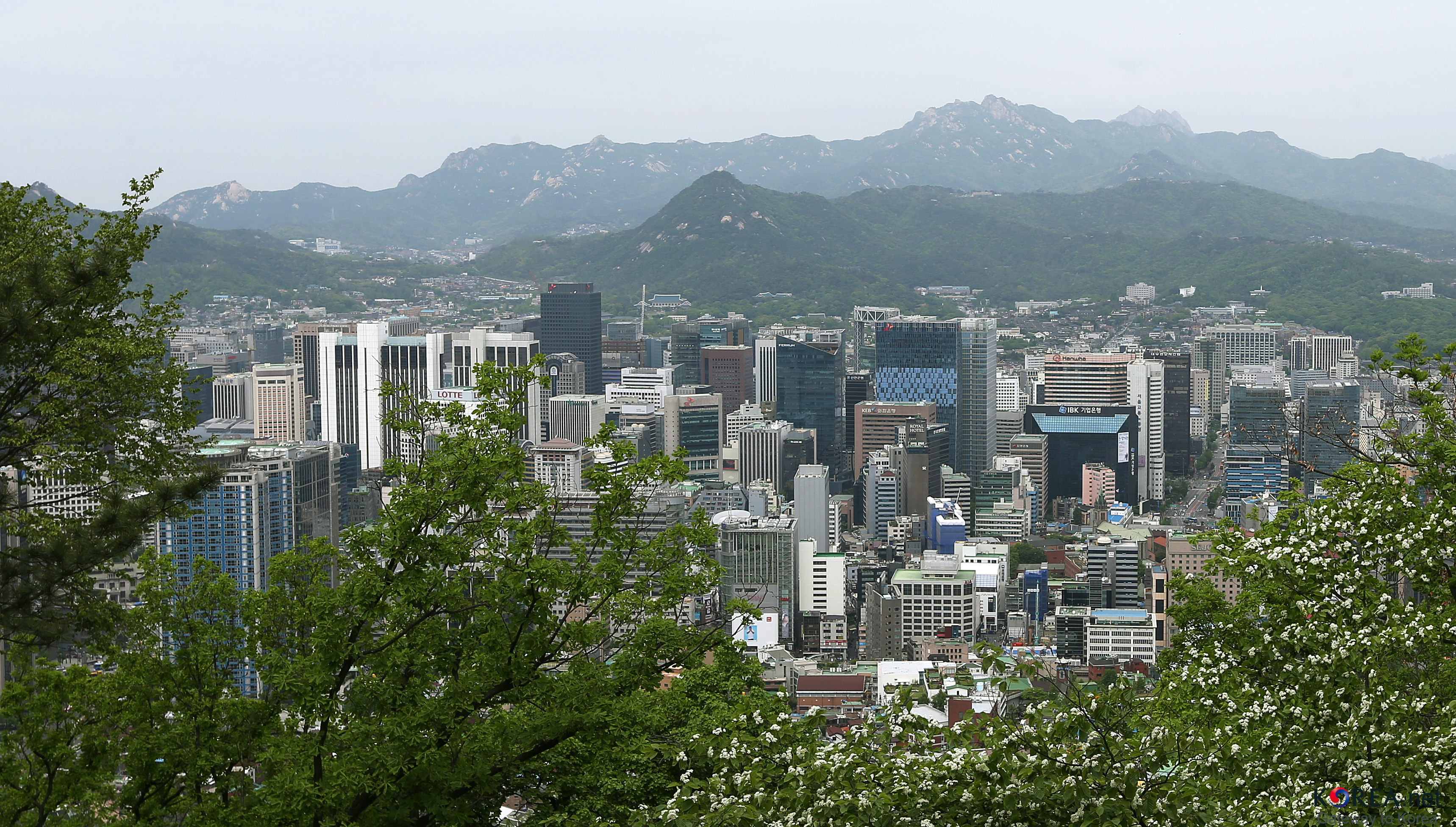 Korea_RainyDay_Seoul_01